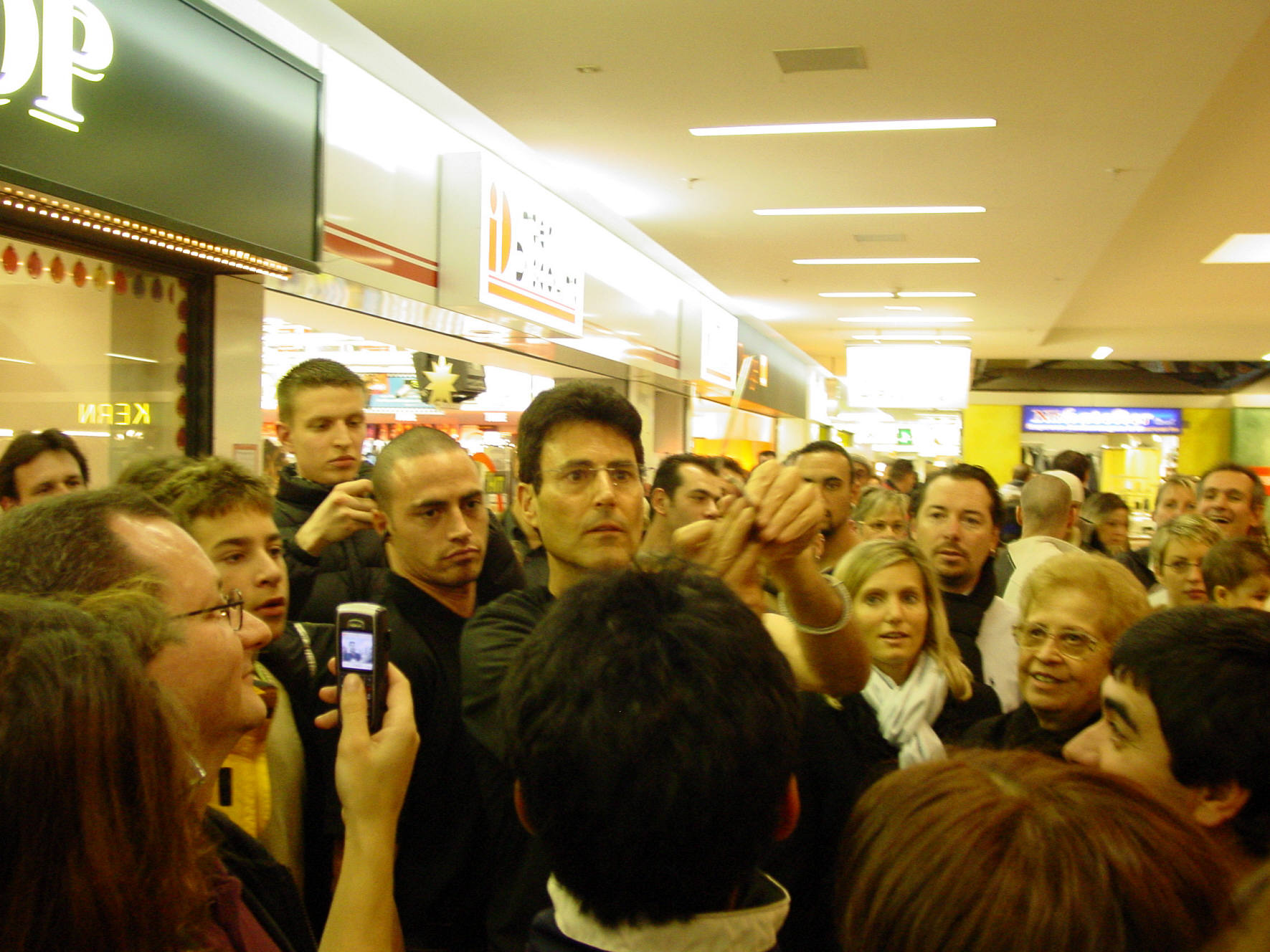 Uri Geller beim Löffelbiegen